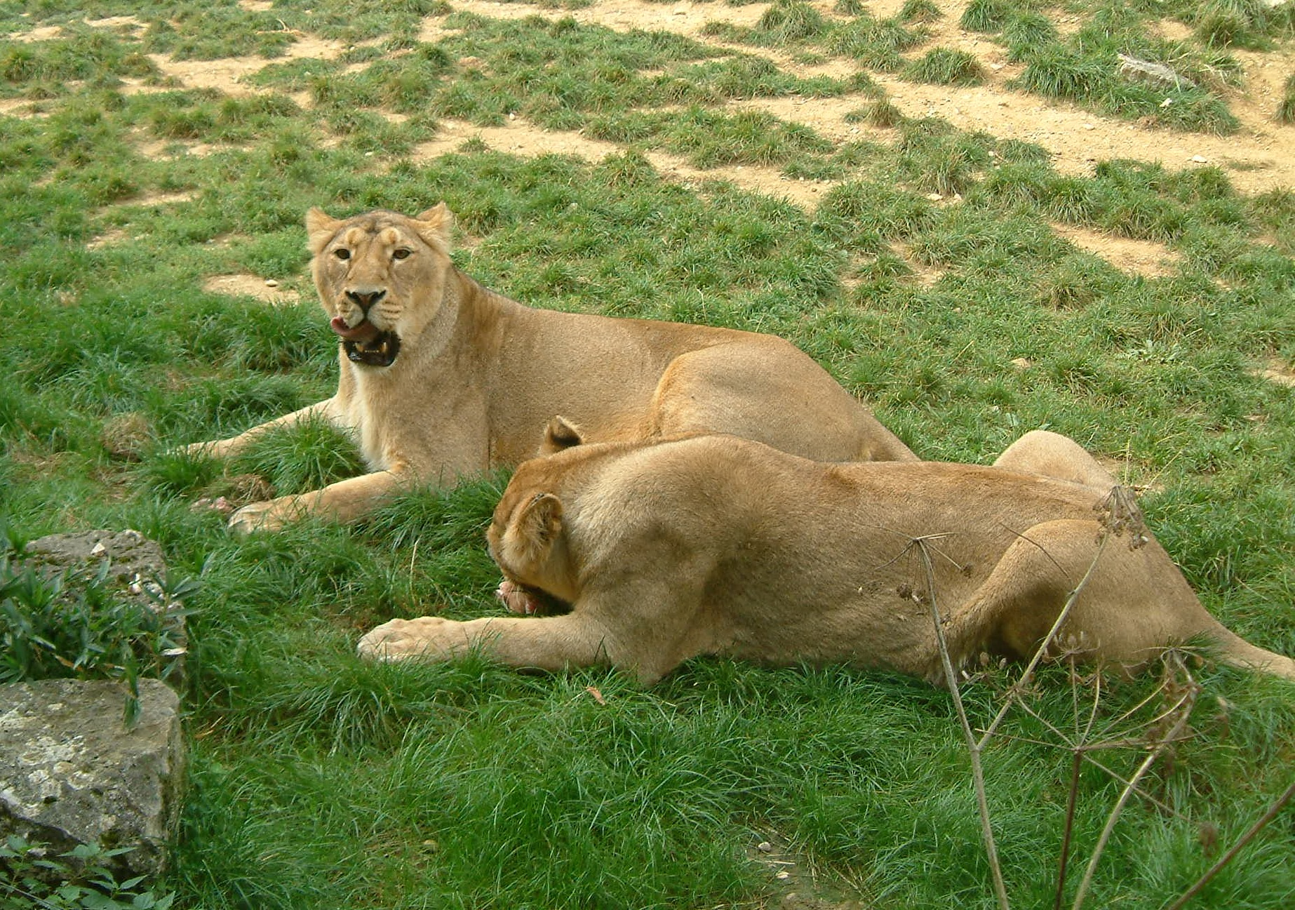 Citadelle de Besançon, Besançon, Franche-Comté, FRANCE